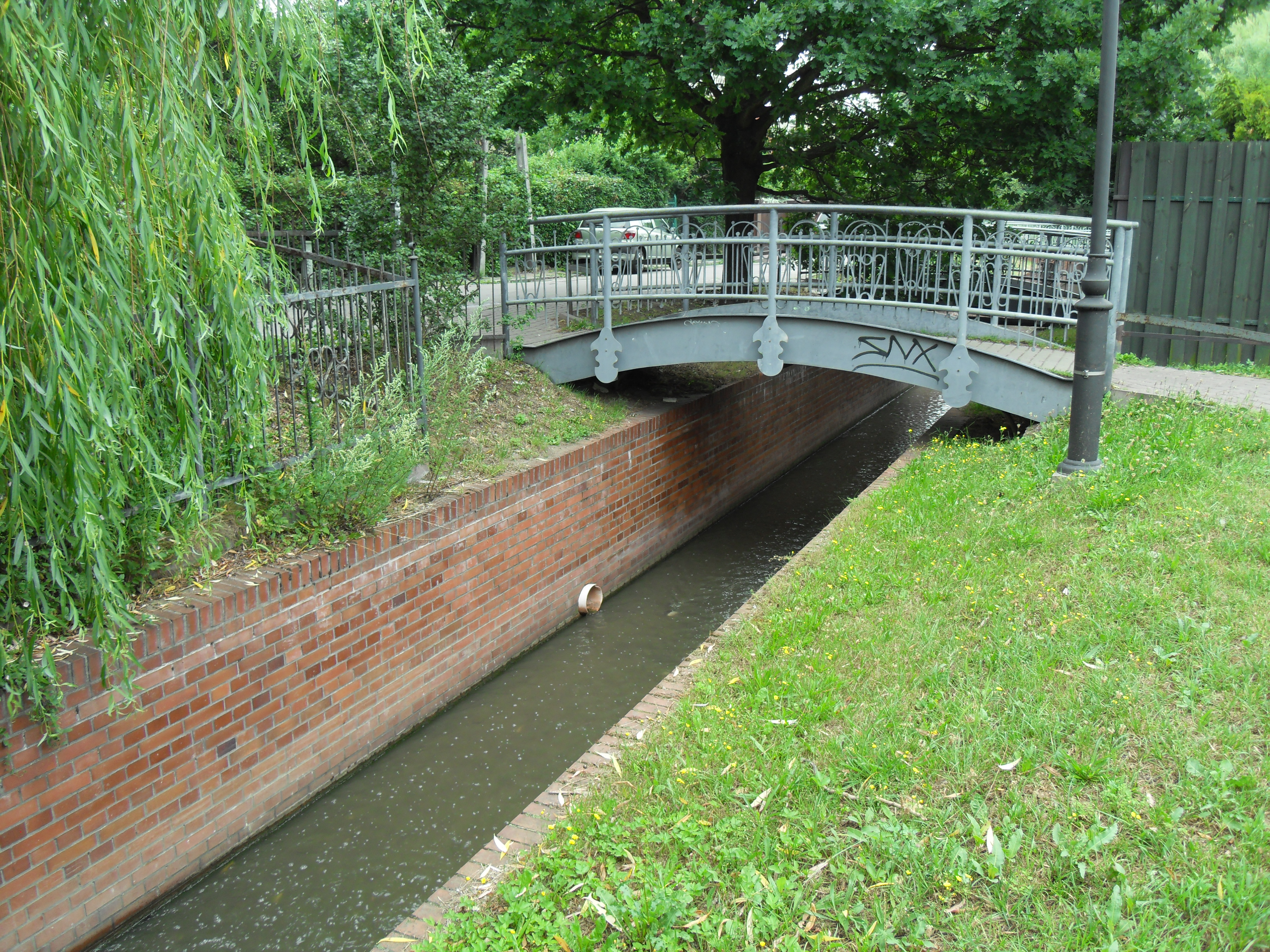 Gdańsk Wrzeszcz. Park Nad Strzyżą.